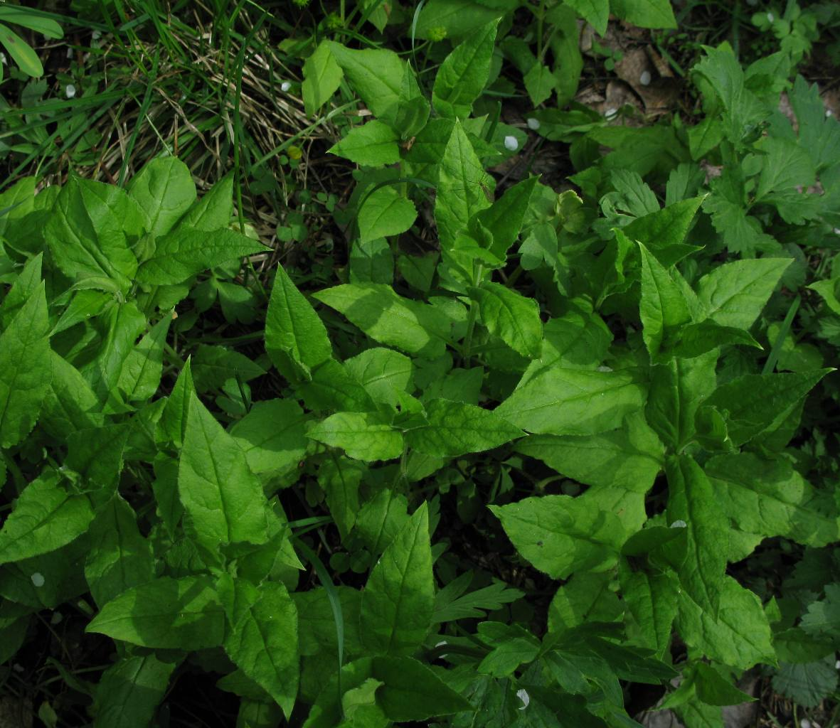 Звездчатка Бунге (Stellaria bungeana) под пологом леса в пойме р. Лалетиной. Окрестности Красноярска, заповедник "Столбы".